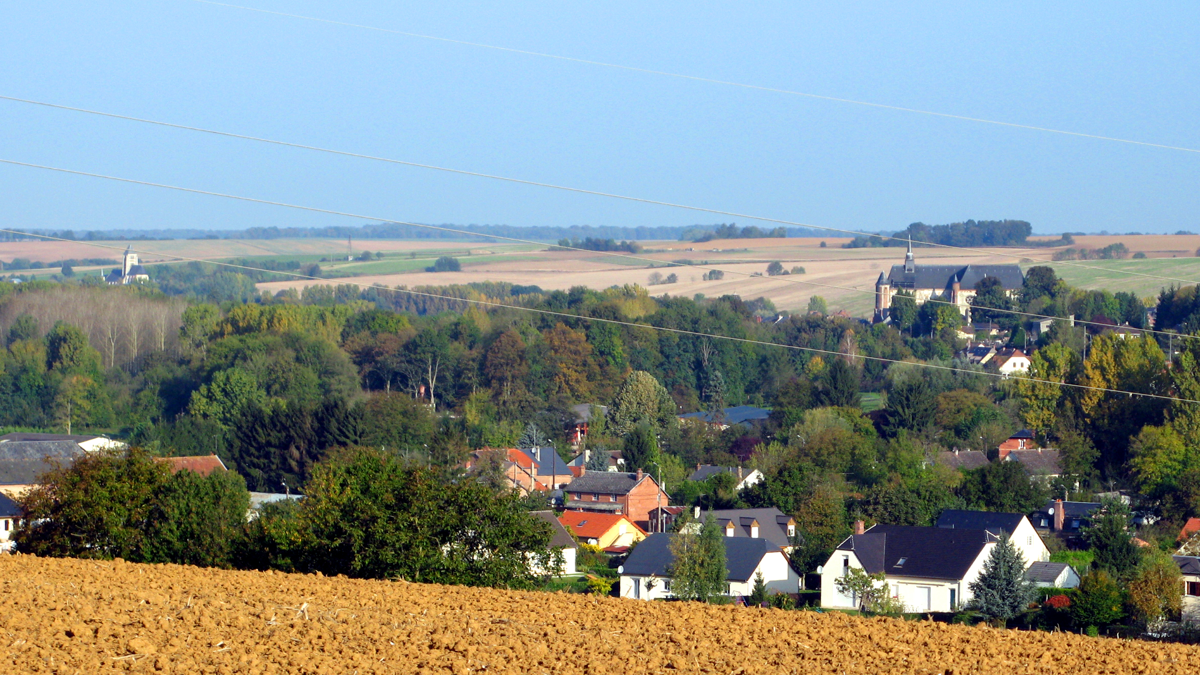 Chaourse et Montcornet (Aisne, France) - Les 2 églises fortifiées, la vallée de la Serre. Vue depuis les "hauteurs" de Lislet (village immédiatement au Sud-Est de Montcornet).